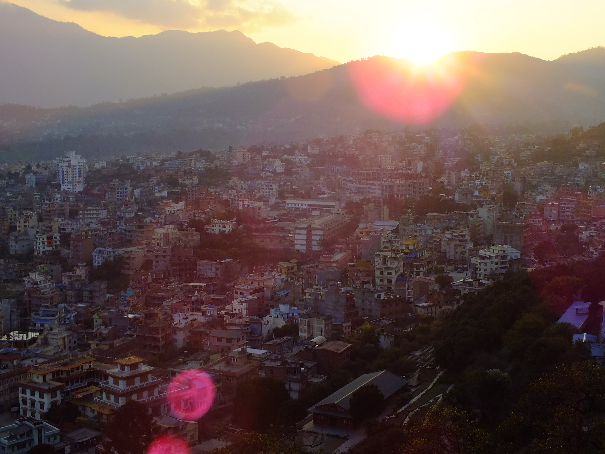 2015-03-08 Swayambhunath,Katmandu,Nepal,Nirvana Cafe & Restaurant,スワヤンブナート